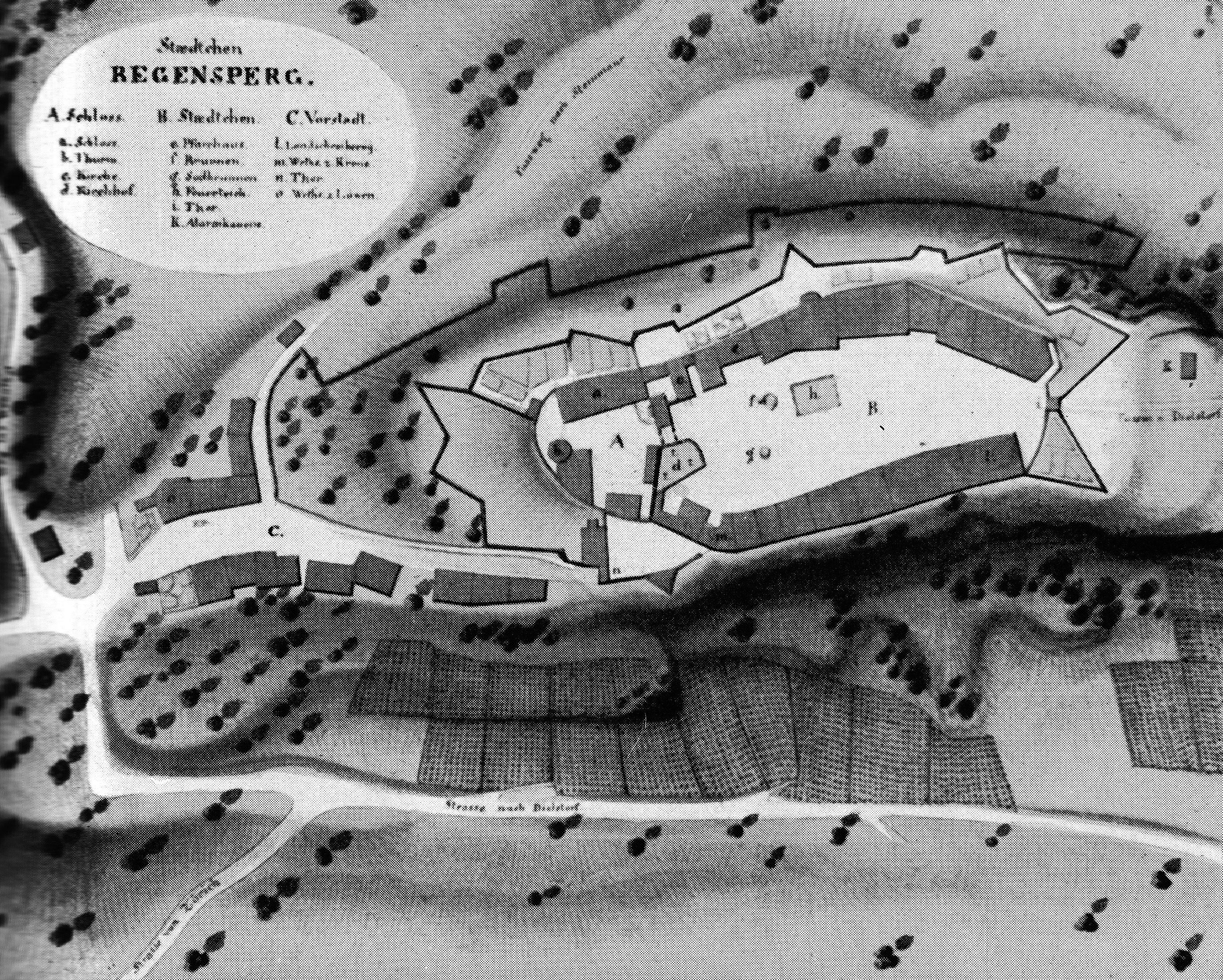 Plan des Städtchens Regensberg von 1840; Zeichnung Ludwig Schultheſſens: Die südöstliche Hälfte des Hornwerkes des ehemaligen Dielsdorfer Tores ist erhalten: auf der Zeichung ganz rechts